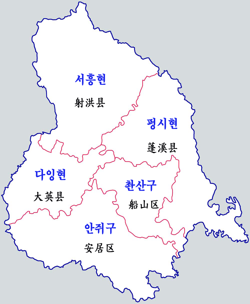 쑤이닝시 현급행정구역